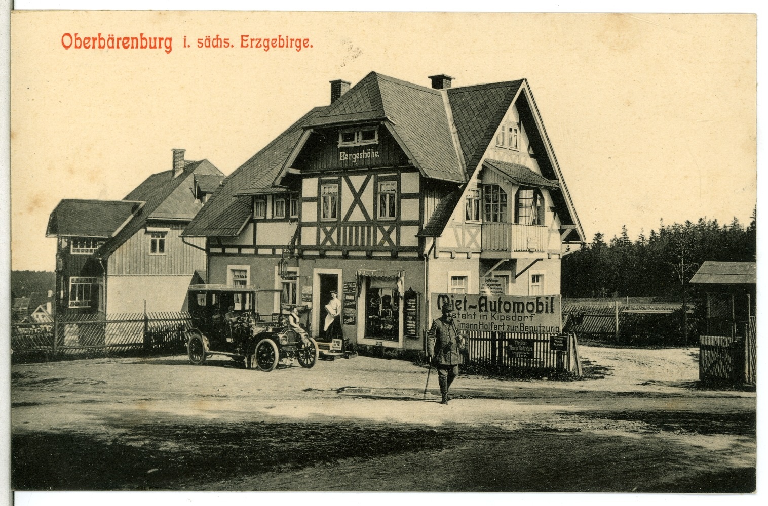 Oberbärenburg; Bergeshöhe This postcard is from publisher Brück & Sohn in Meißen ( postcard has a unique number 12943 and is available in a higher resolution at the publisher. This images was uploaded in a cooperation project between Wikipedians and the publisher.